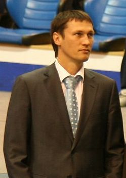 Церемония открытия IX финала Кубка мира по по прыжкам на батуте и акробатической дорожке, Тольятти, Россия. Олег Саитов (двукратный олимпийский чемпион)